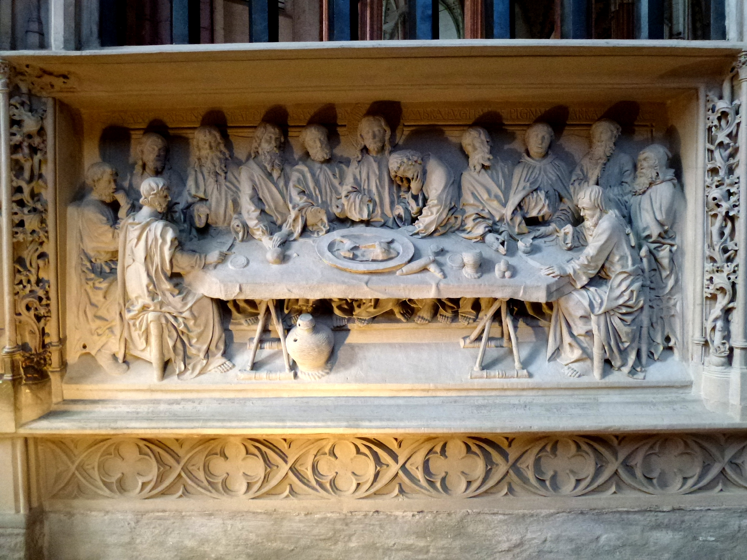 The Last Supper Marienkirche Lübeck Germany